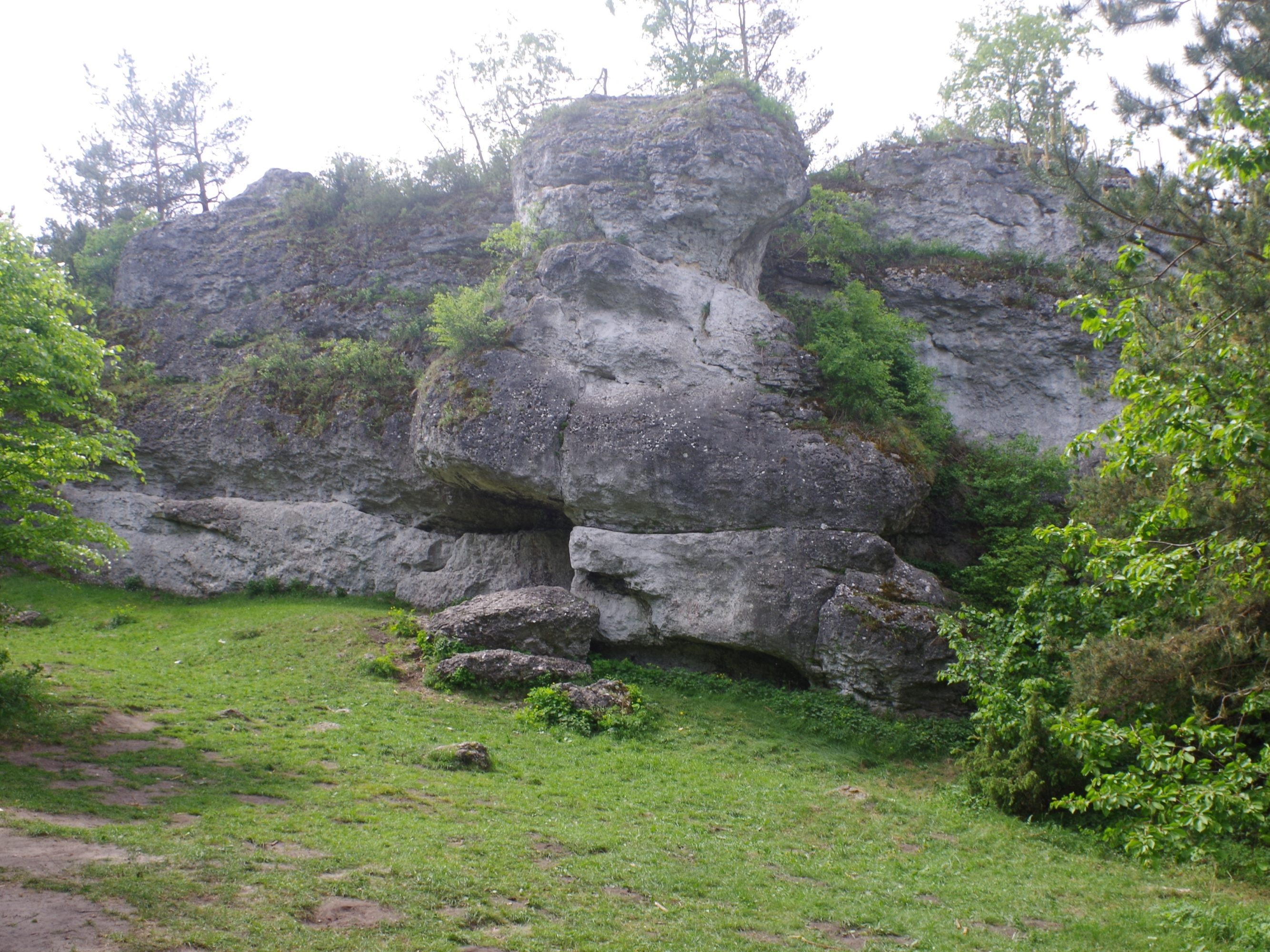 Skała Rygiel na Górze Zborów w Podlesicach